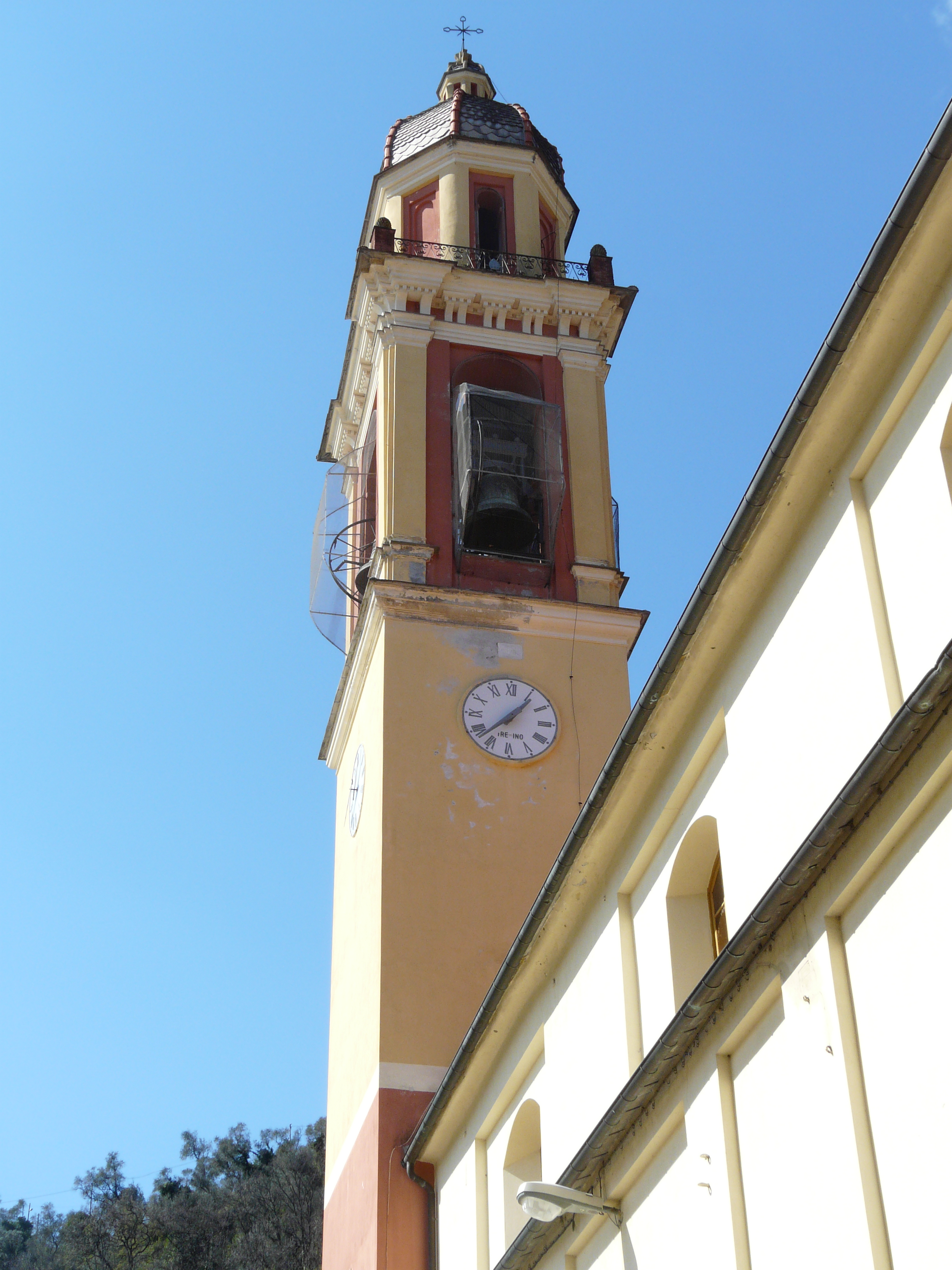 Chiesa di San Pietro, San Pietro di Novella, Rapallo, Liguria, Italia